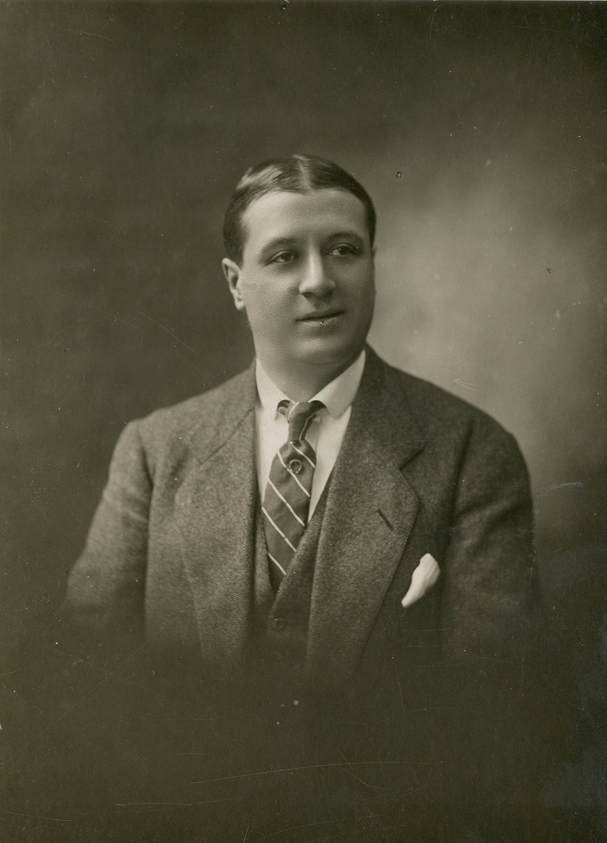 Portrait photographique de Raimu (vers 1920) par le Studio Henri Manuel. Tirage argentique d'époque, 14,7 x 10,6 cm.